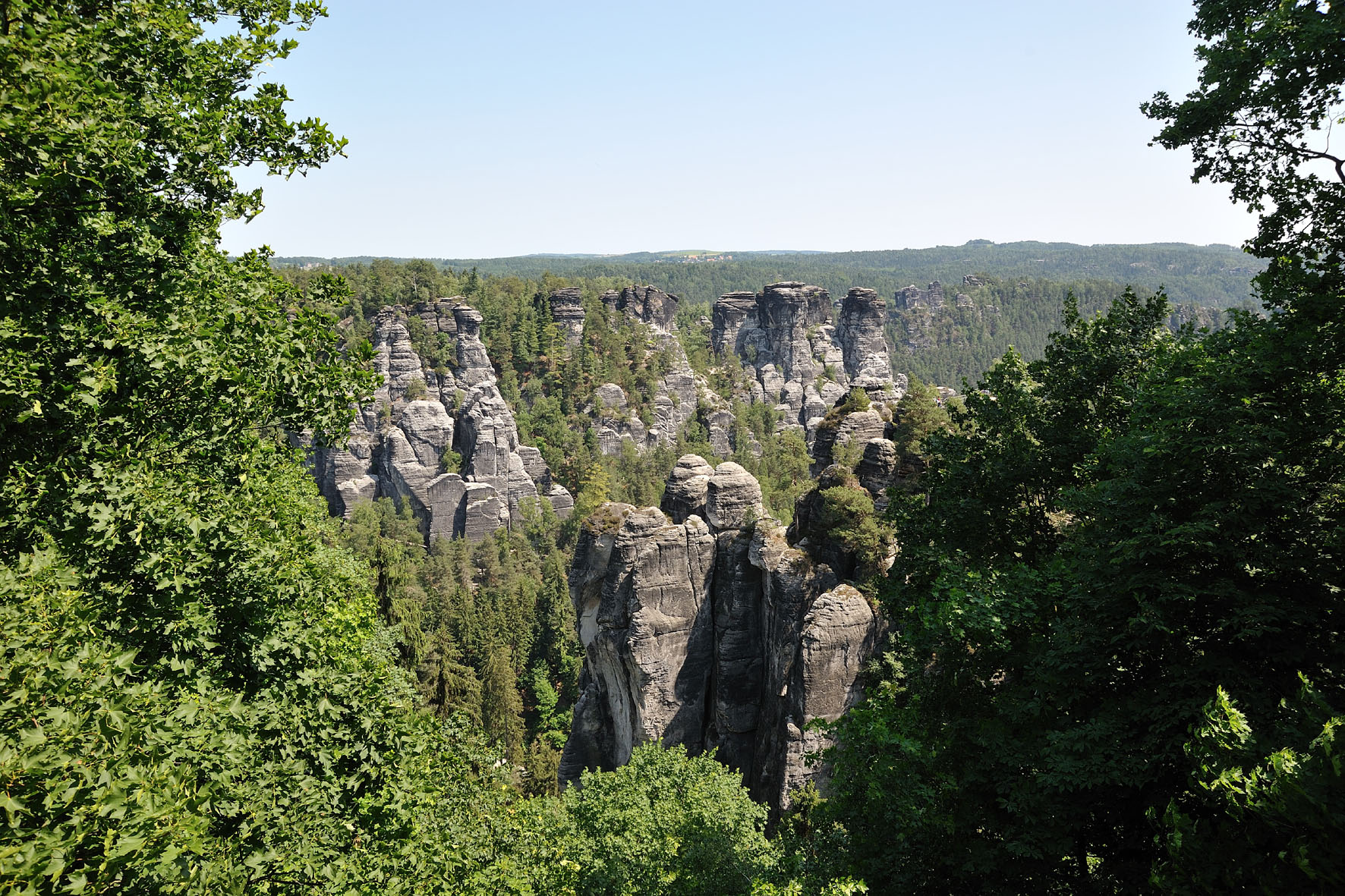 Sächsische Schweiz – Elbsandsteingebirge – Blick von der Bastei